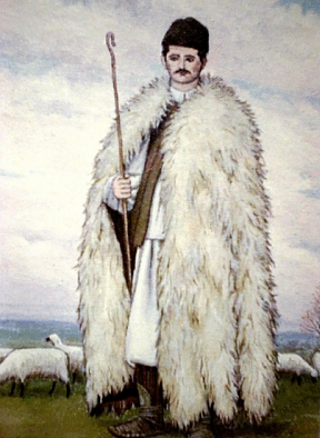 Slika Milana Dvornića "Čoban u opakliji okrenutoj za kišovito vrijeme"